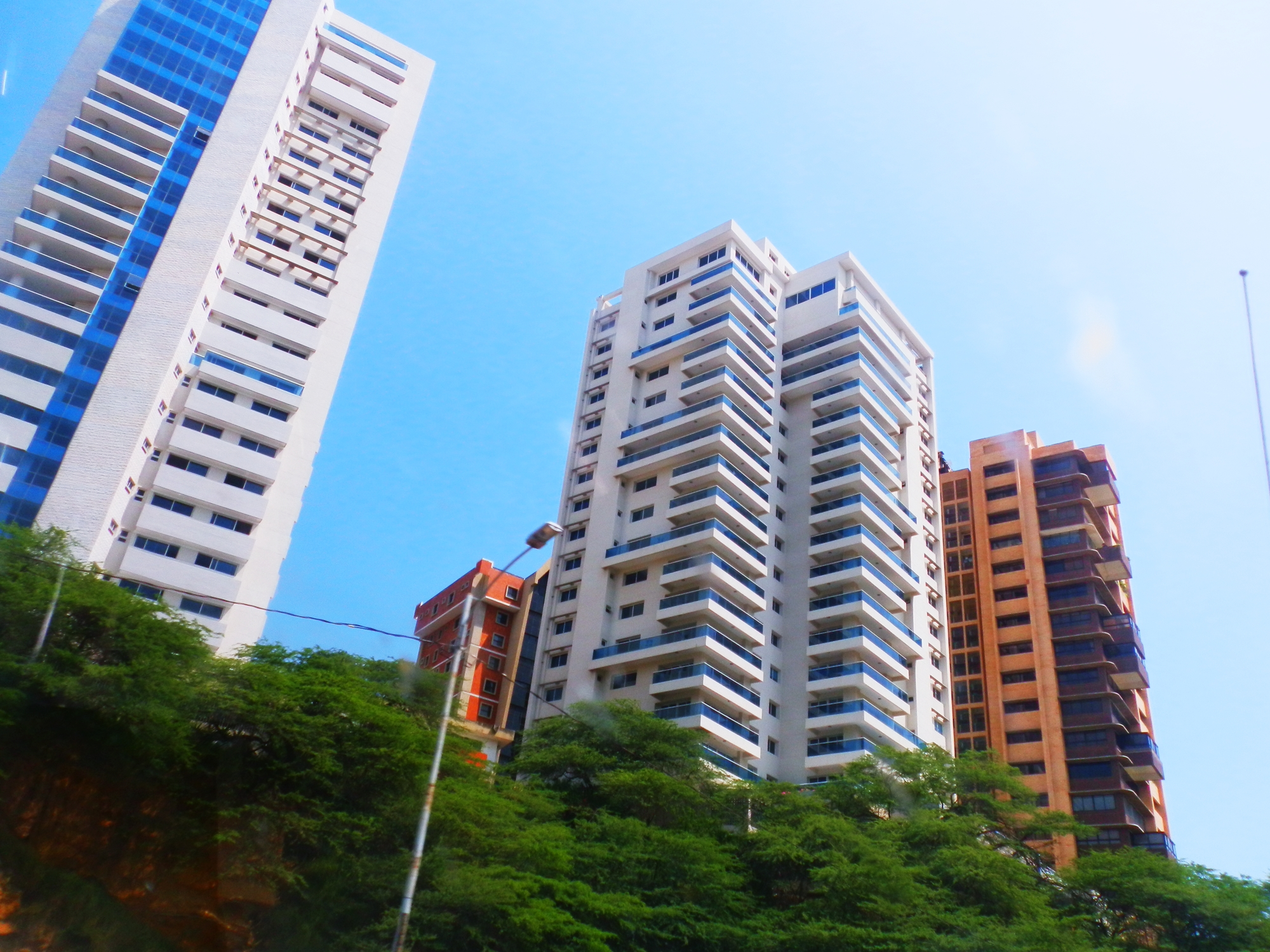 Edificios en la Avenida El Milagro, Maracaibo, Venezuela